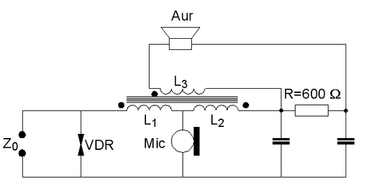 Elkarrizketa zirkuitua